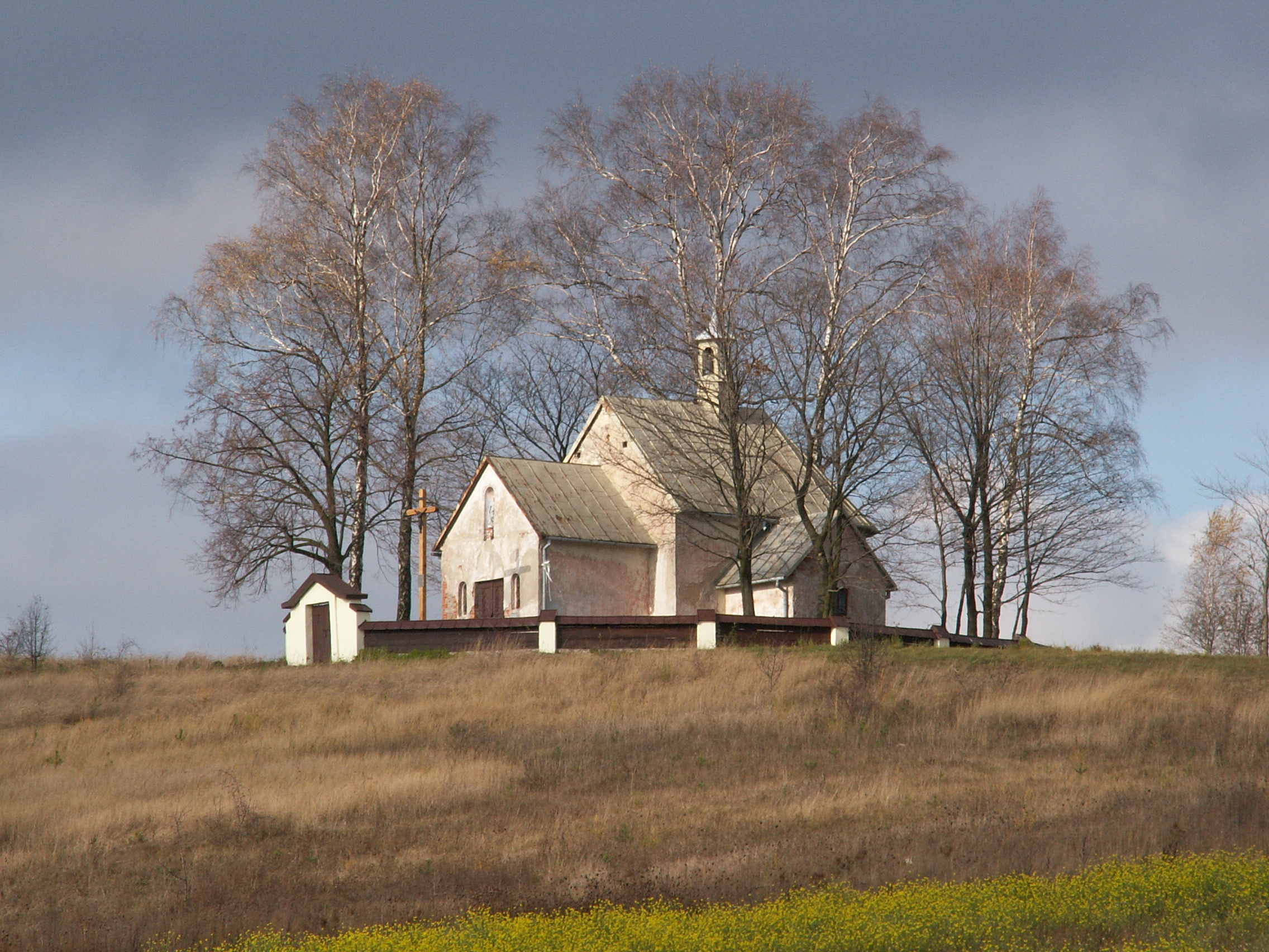 Kościół w Kostomłotach